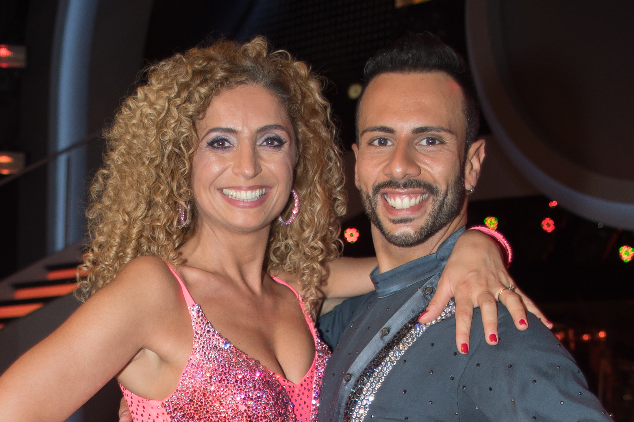 ORF Dancing Stars am 31. März 2017. Bild zeigt Eser Ari-Akbaba und Danilo Campisi.